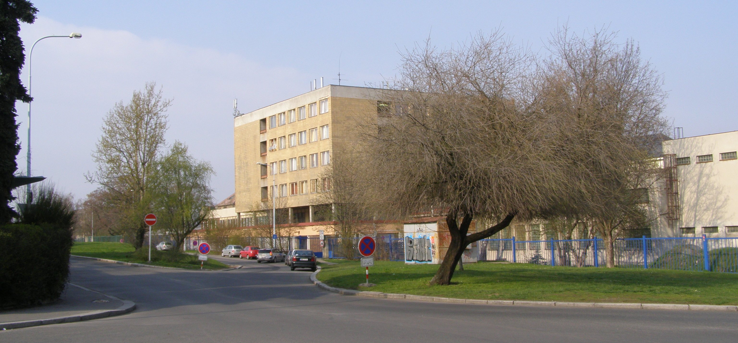 Praha, Břevnov, ulice Stamicova, Ústřední vojenská nemocnice.